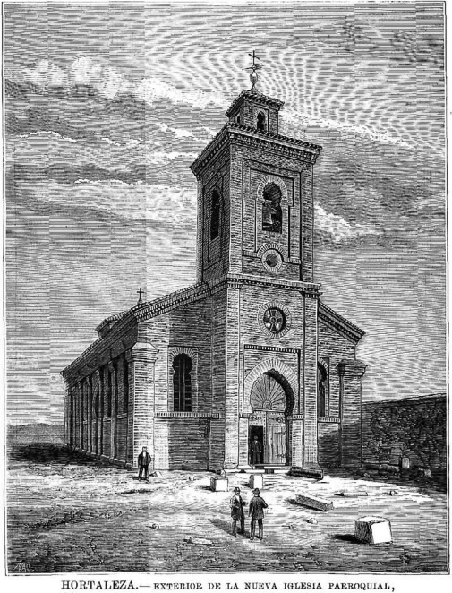 Hortaleza - exterior de la nueva iglesia Parroquial.